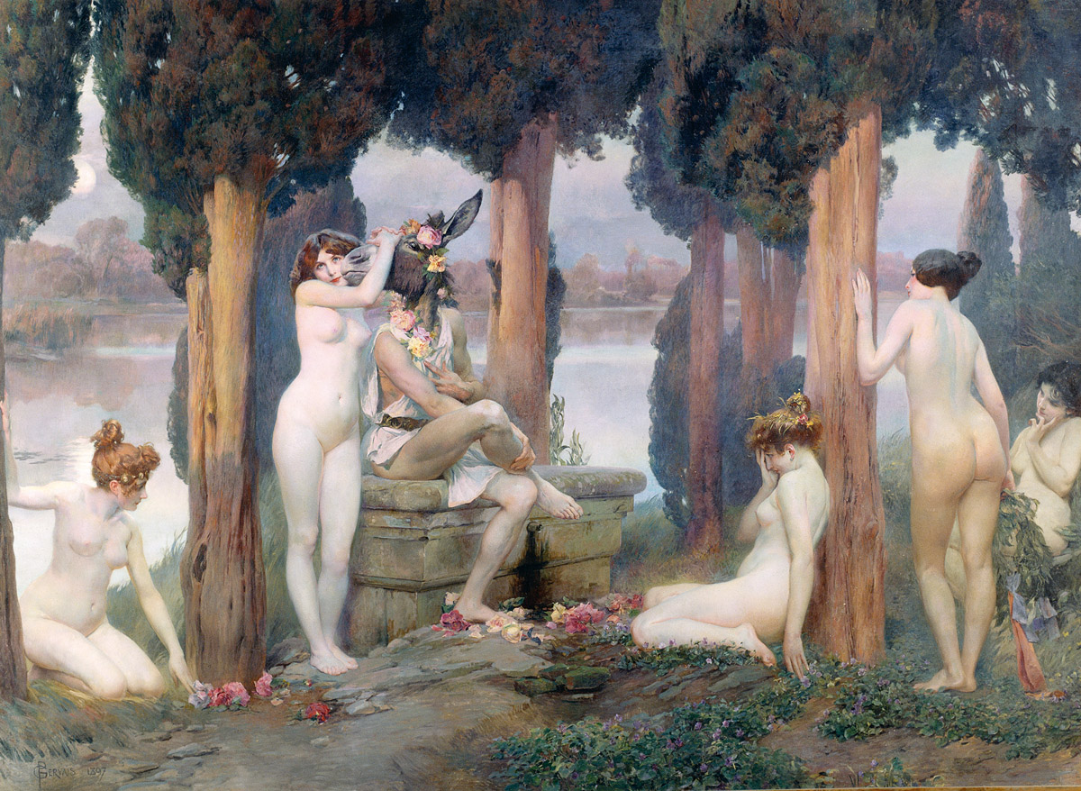 La Folie de Titania, Paul Gervais, 1897.